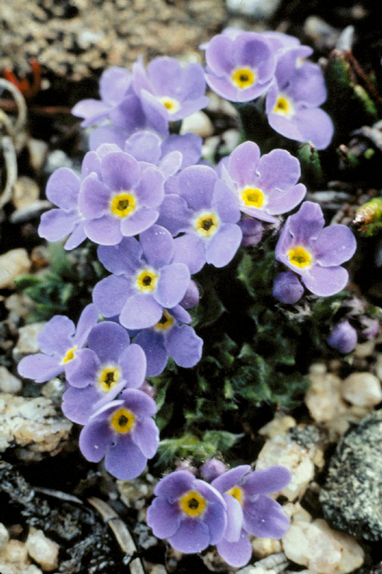 Myosotis